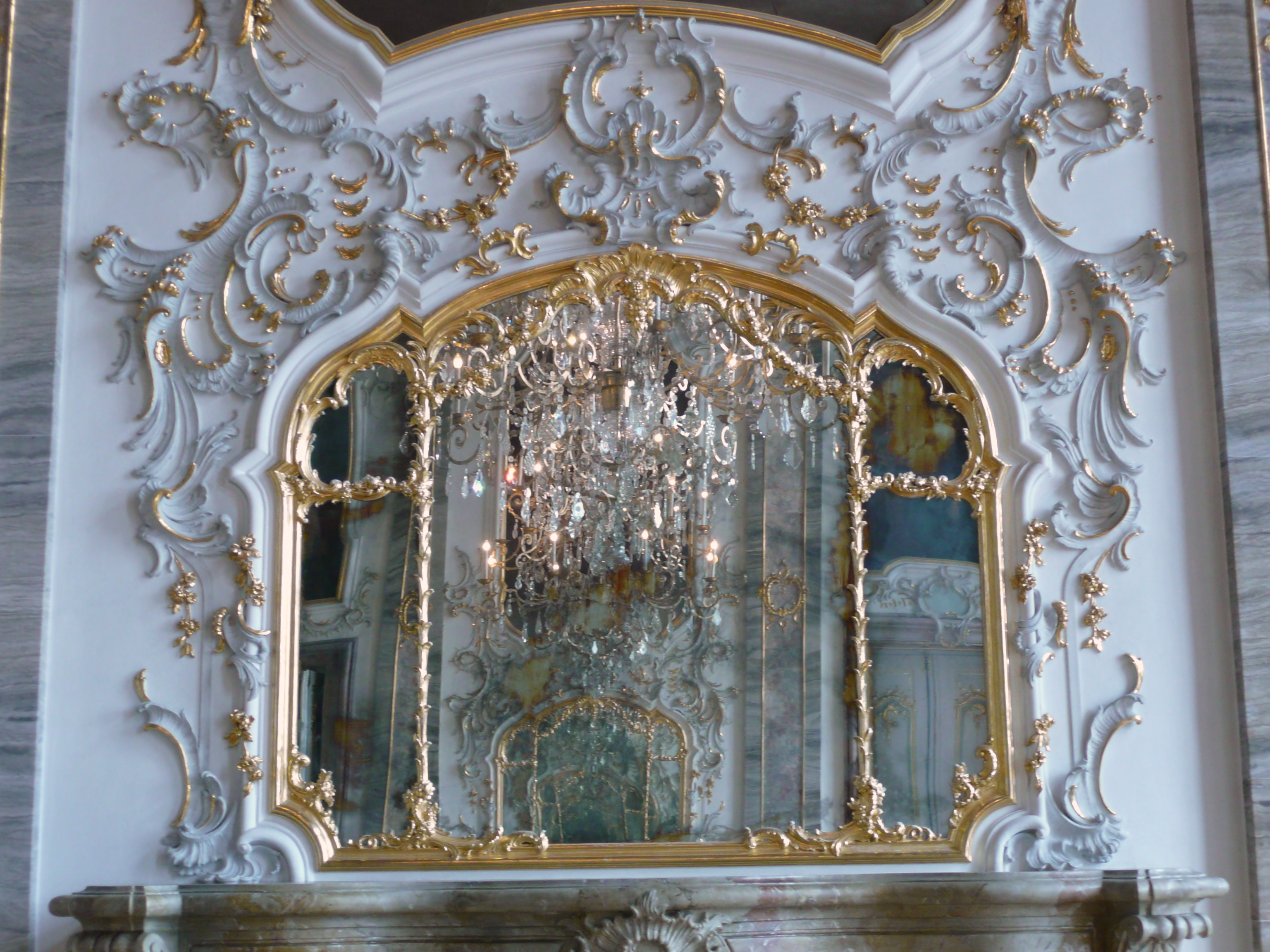 Schloss Ludwigsburg; Spiegelsaal